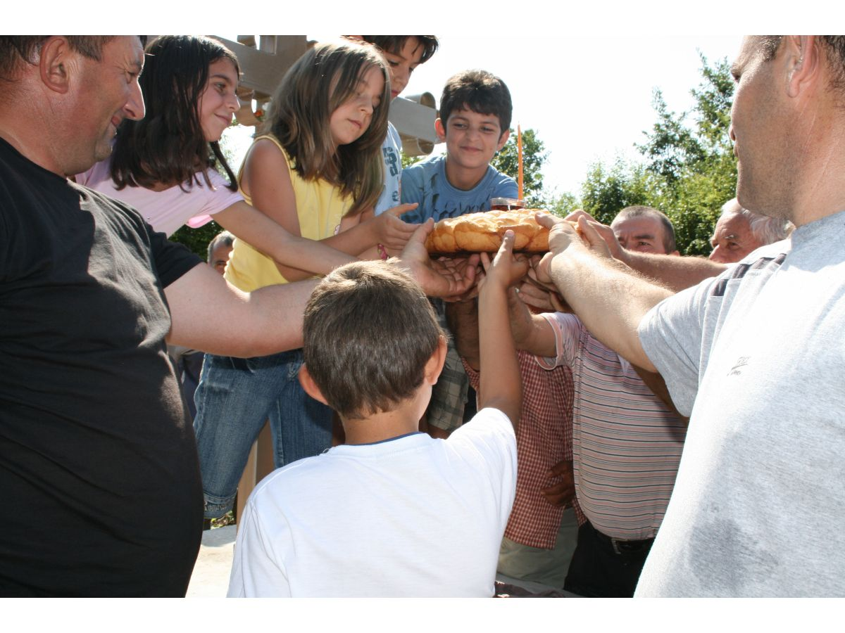 Secenje kolaca u cast Ognjane Marije.